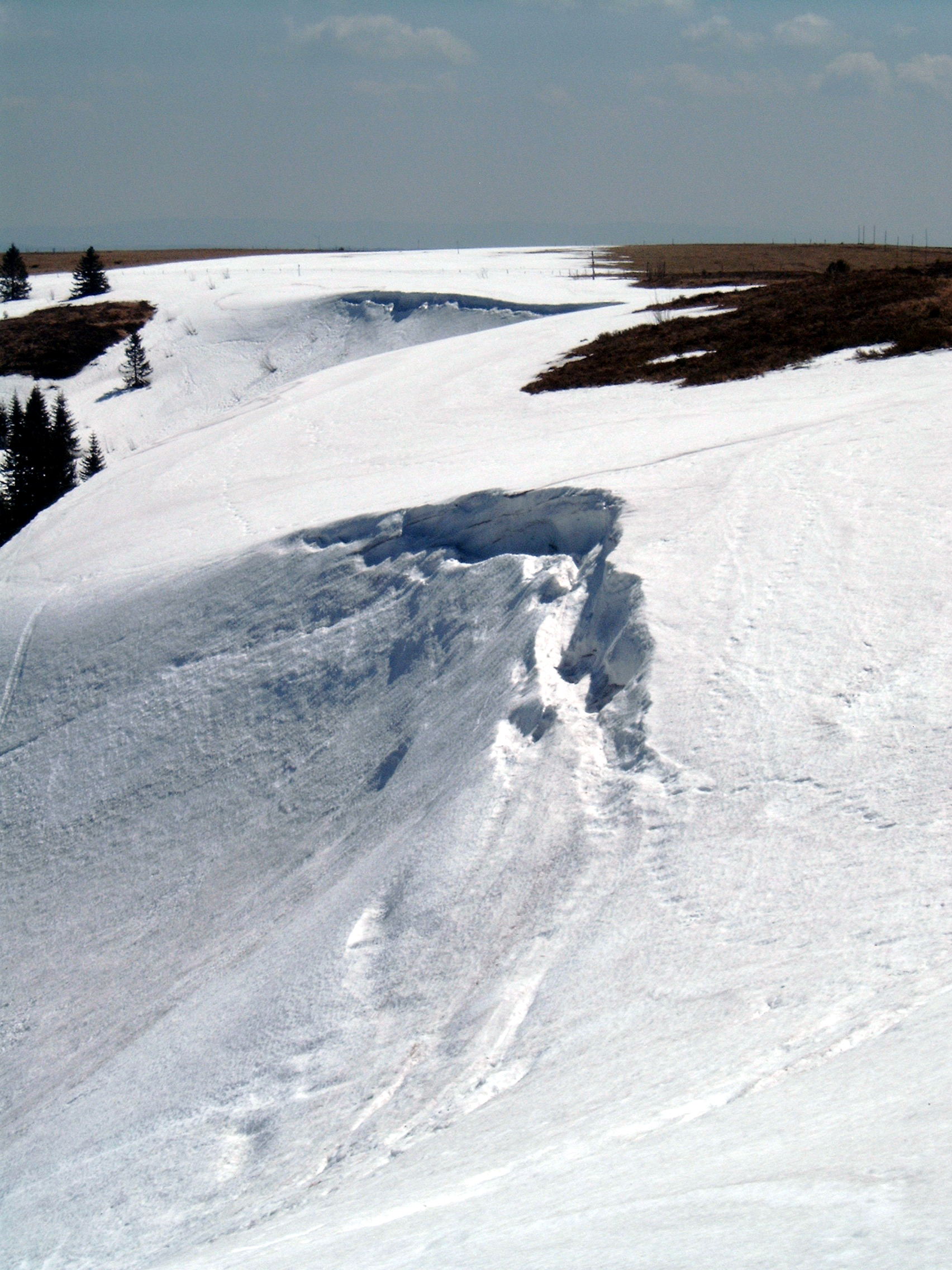 Hang am Zastler Loch mit Wechten